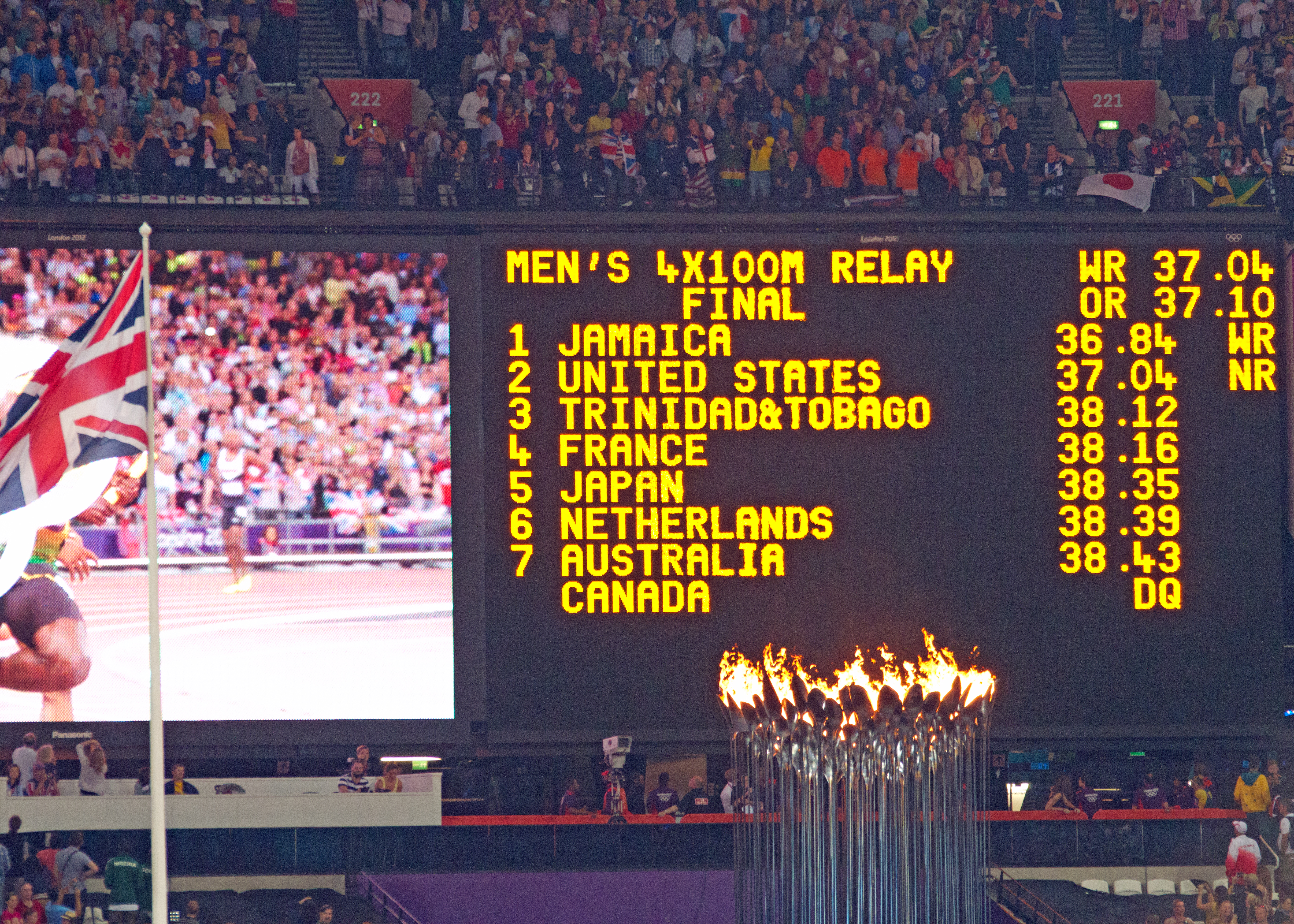 London 2012